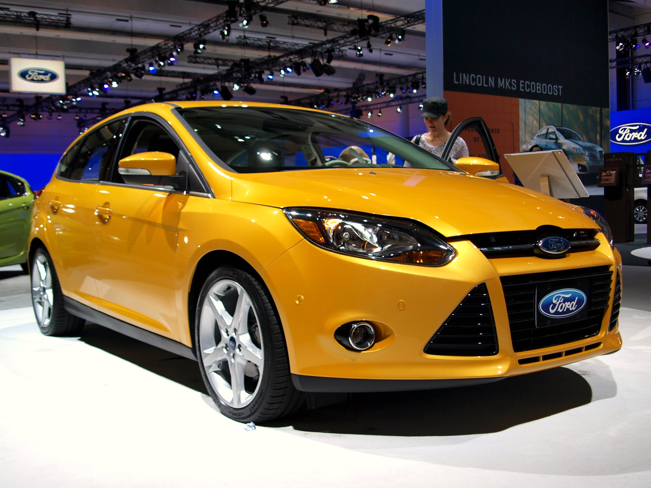 2012 Ford Focus Titanium